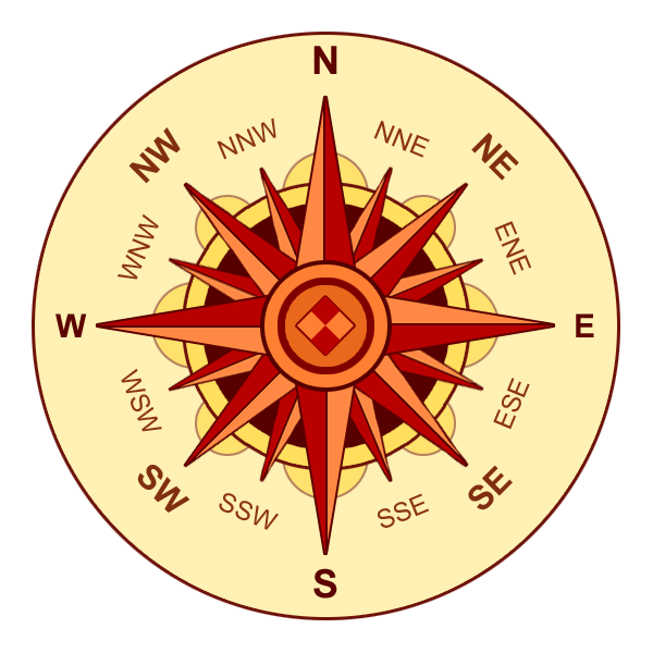 compass rose